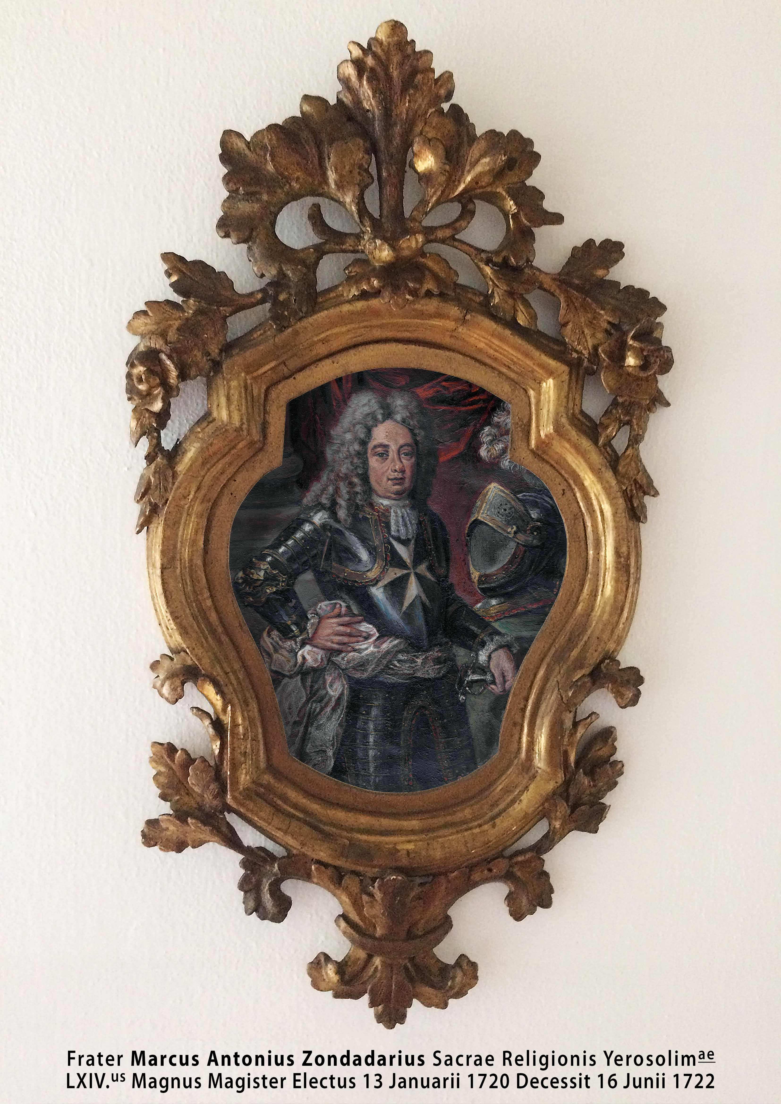 Olio su rame. Sul retro appare la scritta: "Frater Marcus Antonius Zondadarius Sacrae Religionis Yerosolim.ae LXIV.us Magnus Magister Electus 13 Januarii 1720 Decessit 16 Junii 1722"